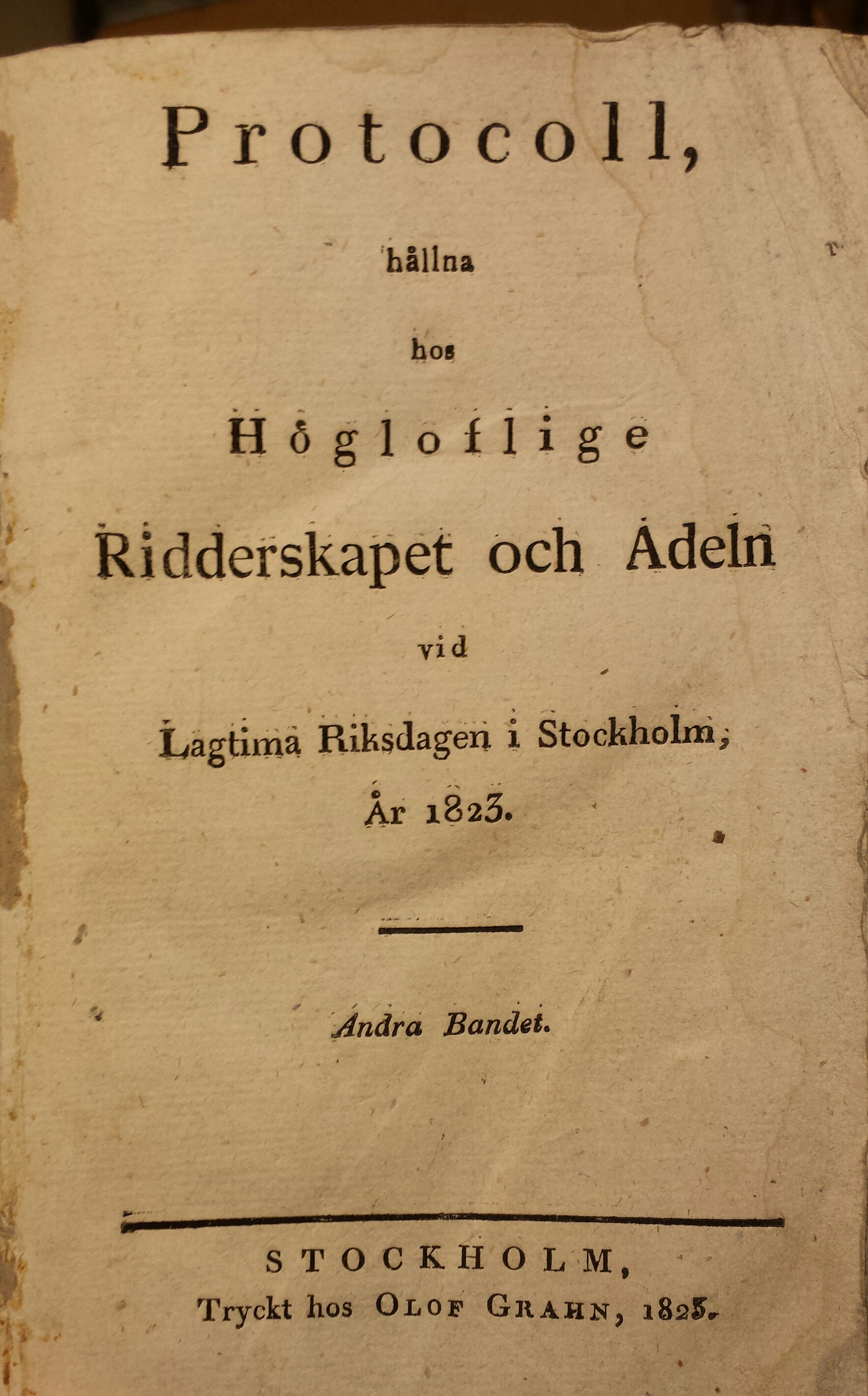 Titelsida till ridderskapet och adelns protokoll 1823.